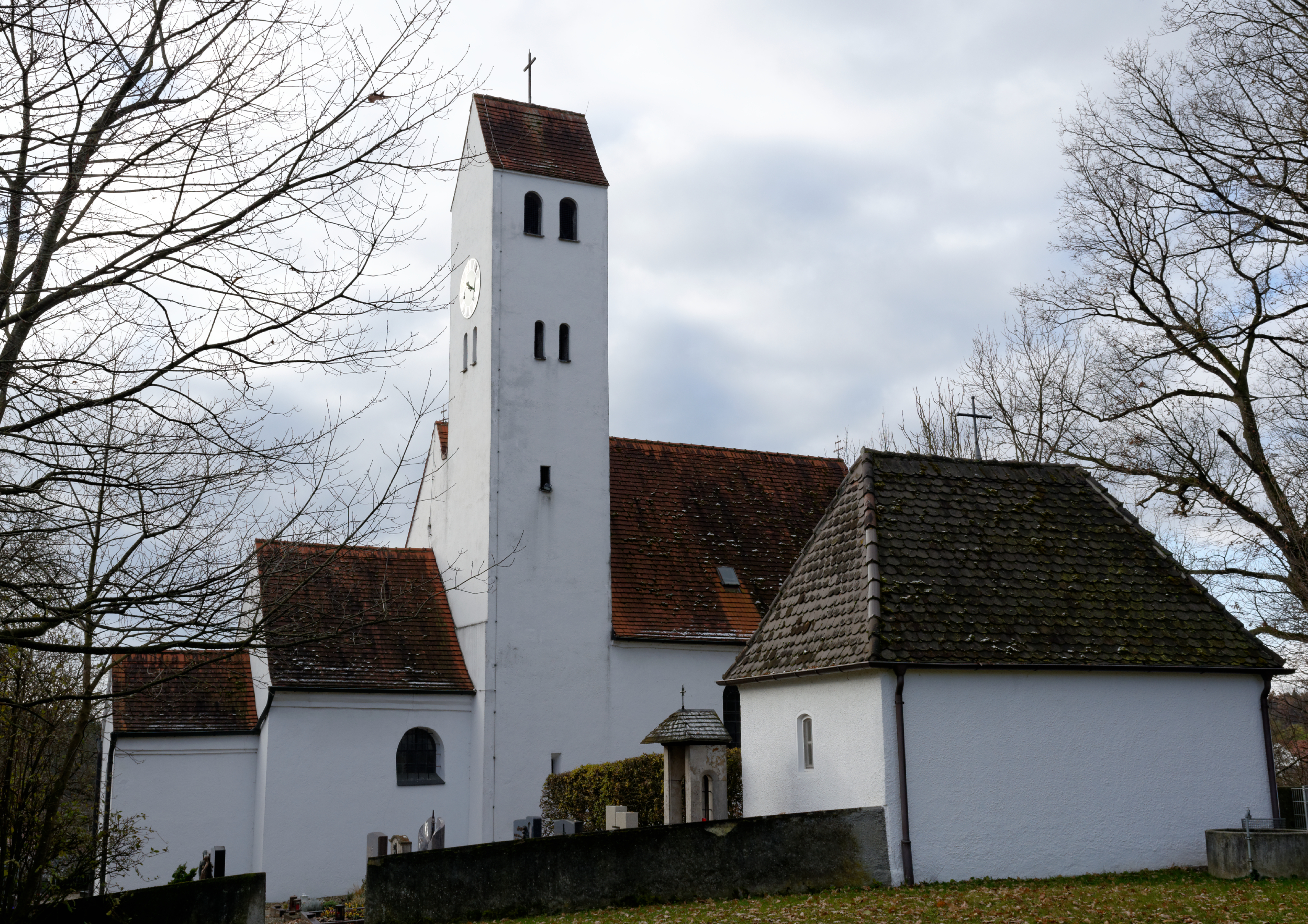 St. Philipp u. Walburga, früher St. Maria Magdalena, Rohrbach (Friedberg)